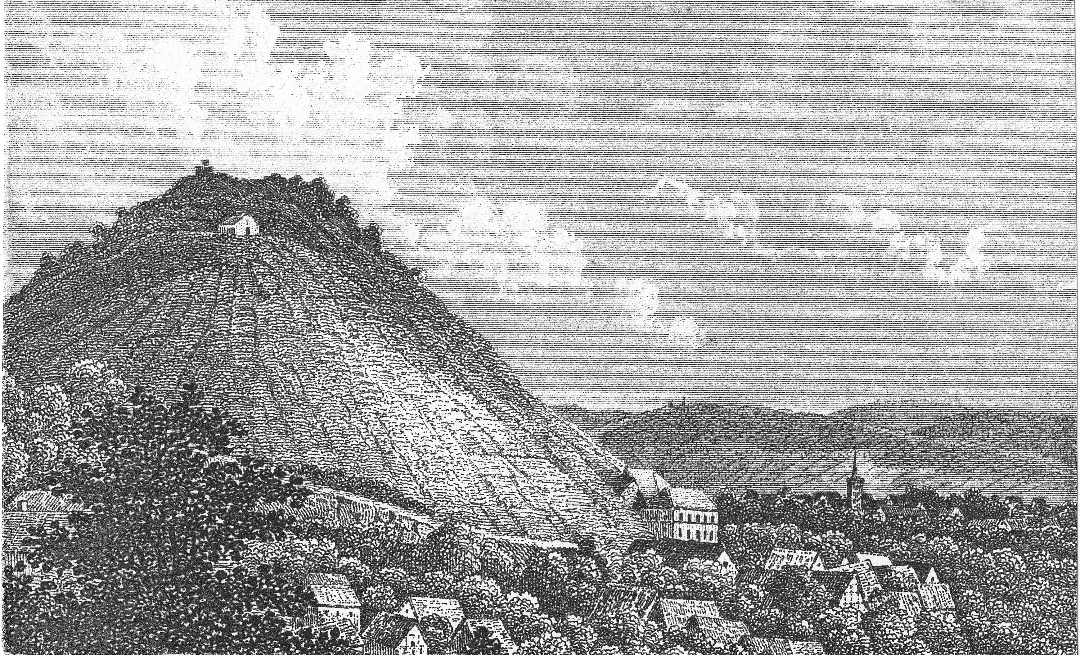 Stich von Schlickum ca. 1840